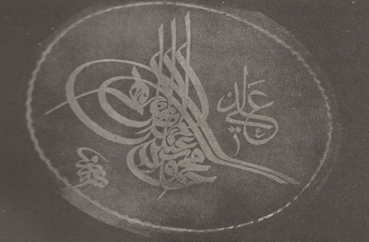 Halil Kâmilî Ağa'nın Astırdığı Hattât Râkım'ım Tuğrası